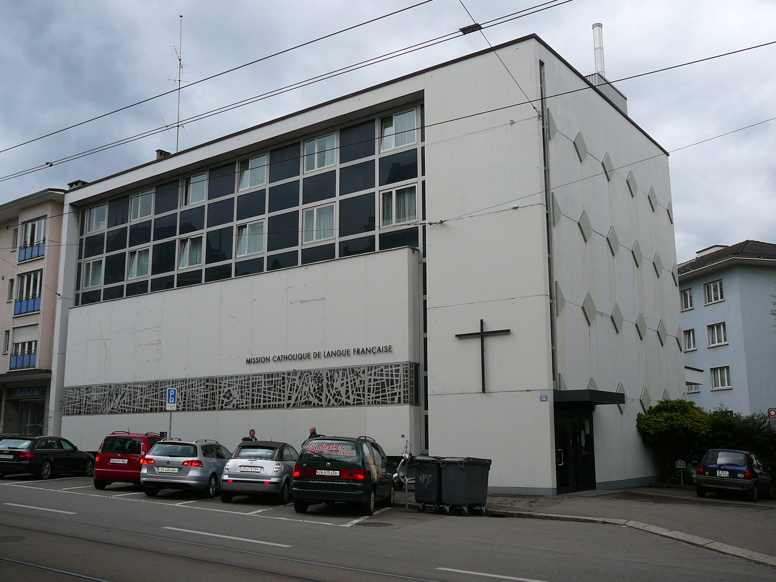 Römisch-katholische Kirche Sainte Famillie in Zürich, Blick von der Hottingerstrasse